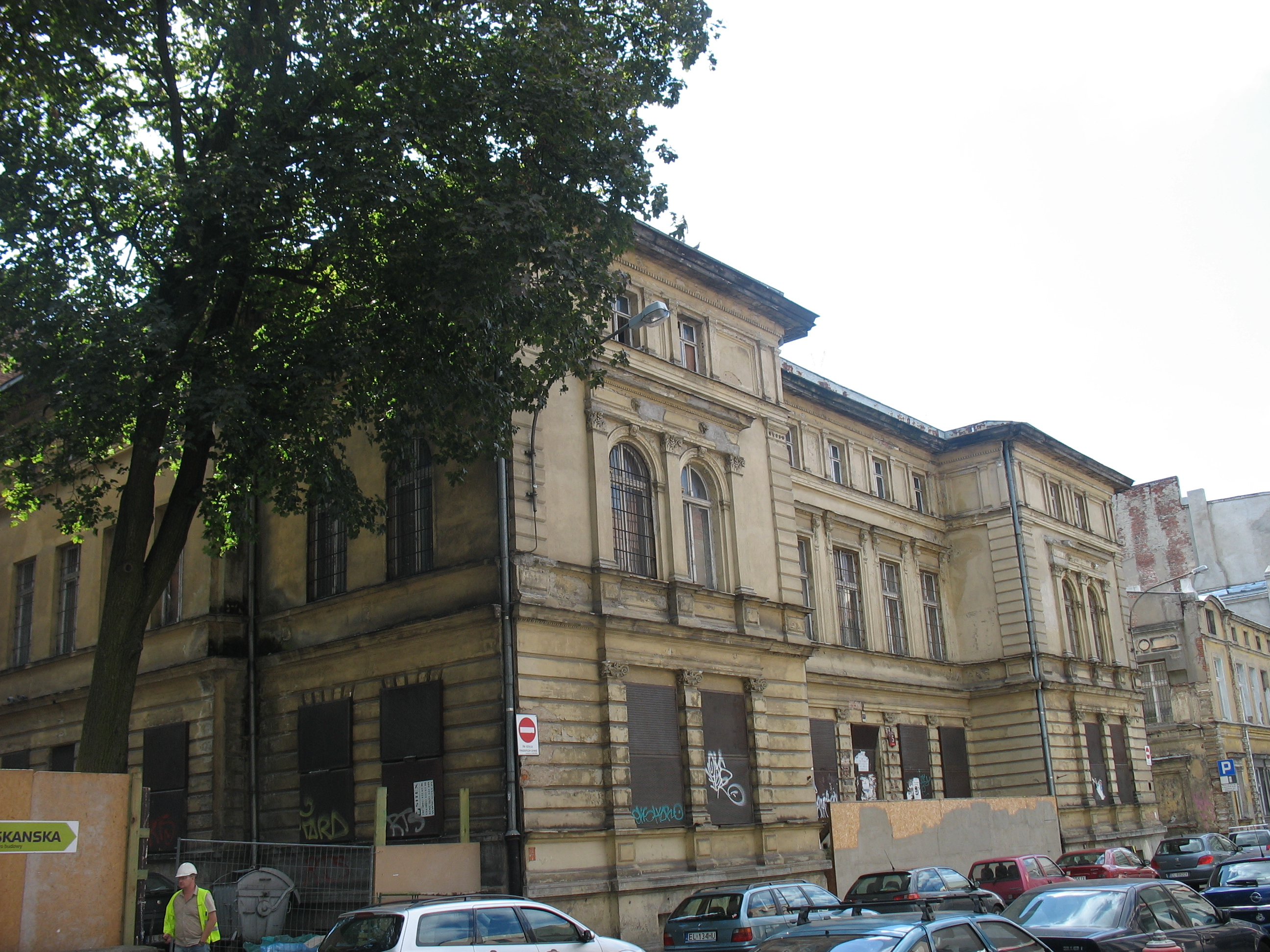 Łódź, Dom przy ul. Moniuszki 5